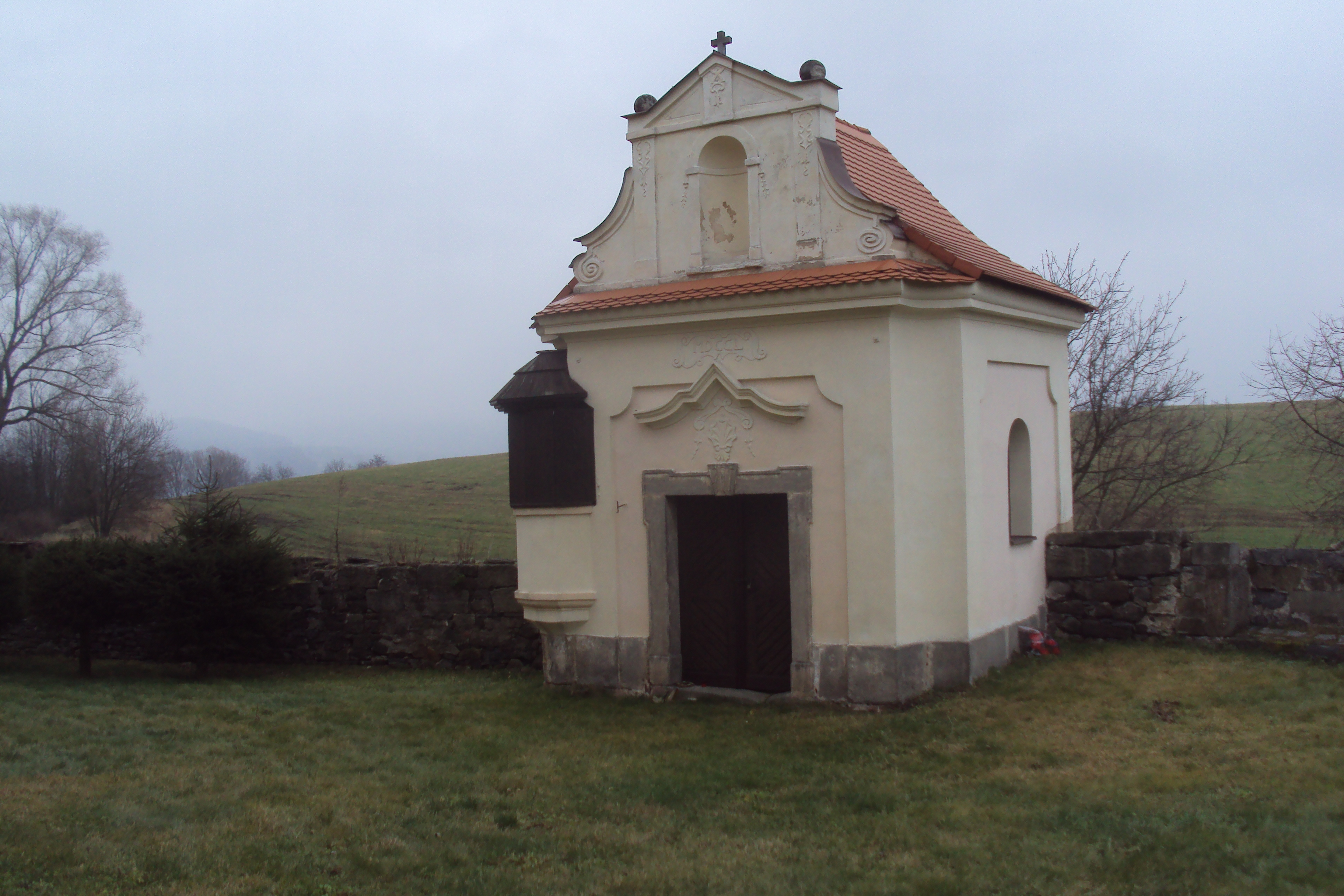 Kaple u kostela